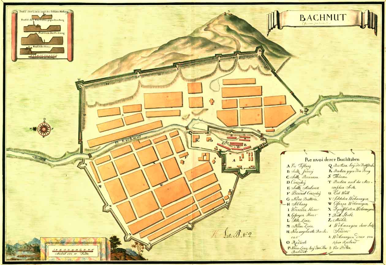 Город Бахмут